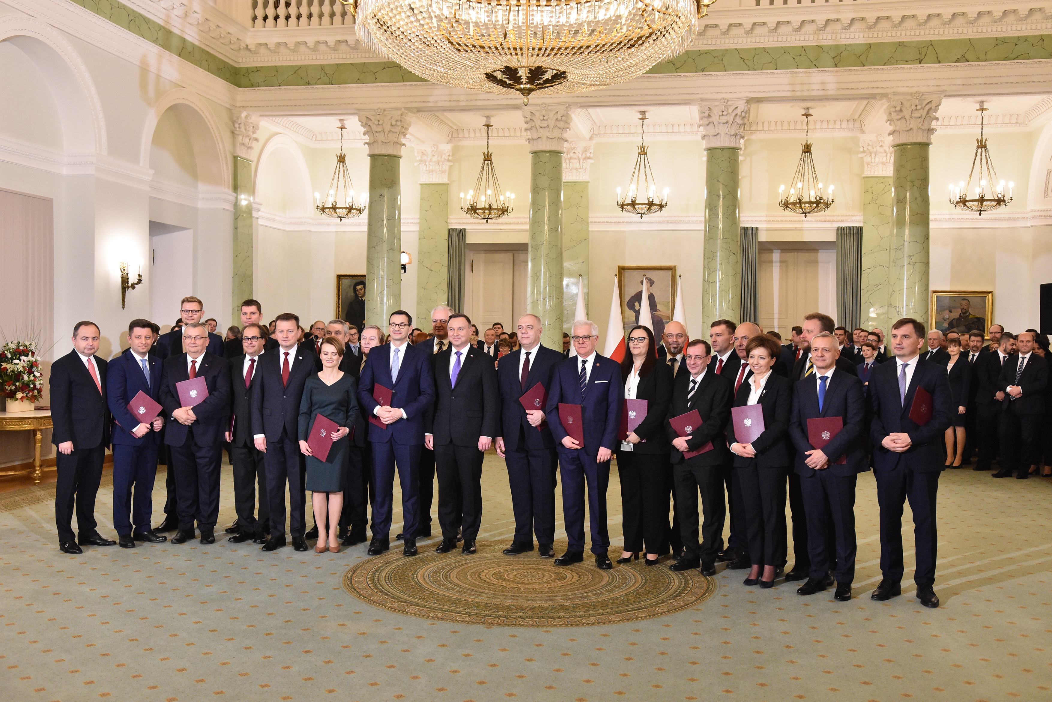 Photo de famille du gouvernement Morawiecki II (avec le président de la République Andrzej Duda) le 15 novembre 2019, jour de son assermentation au palais présidentiel de Varsovie.